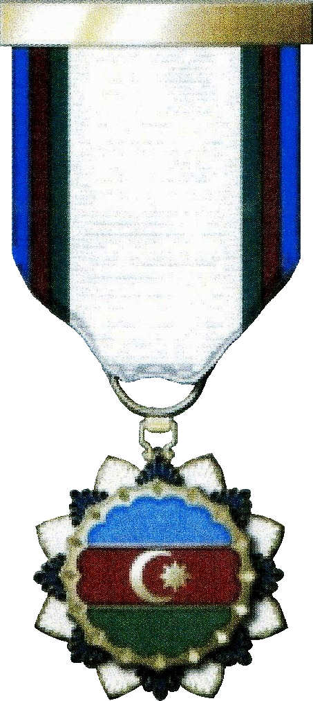 Azərbaycan Bayrağı ordeni (since 2009)